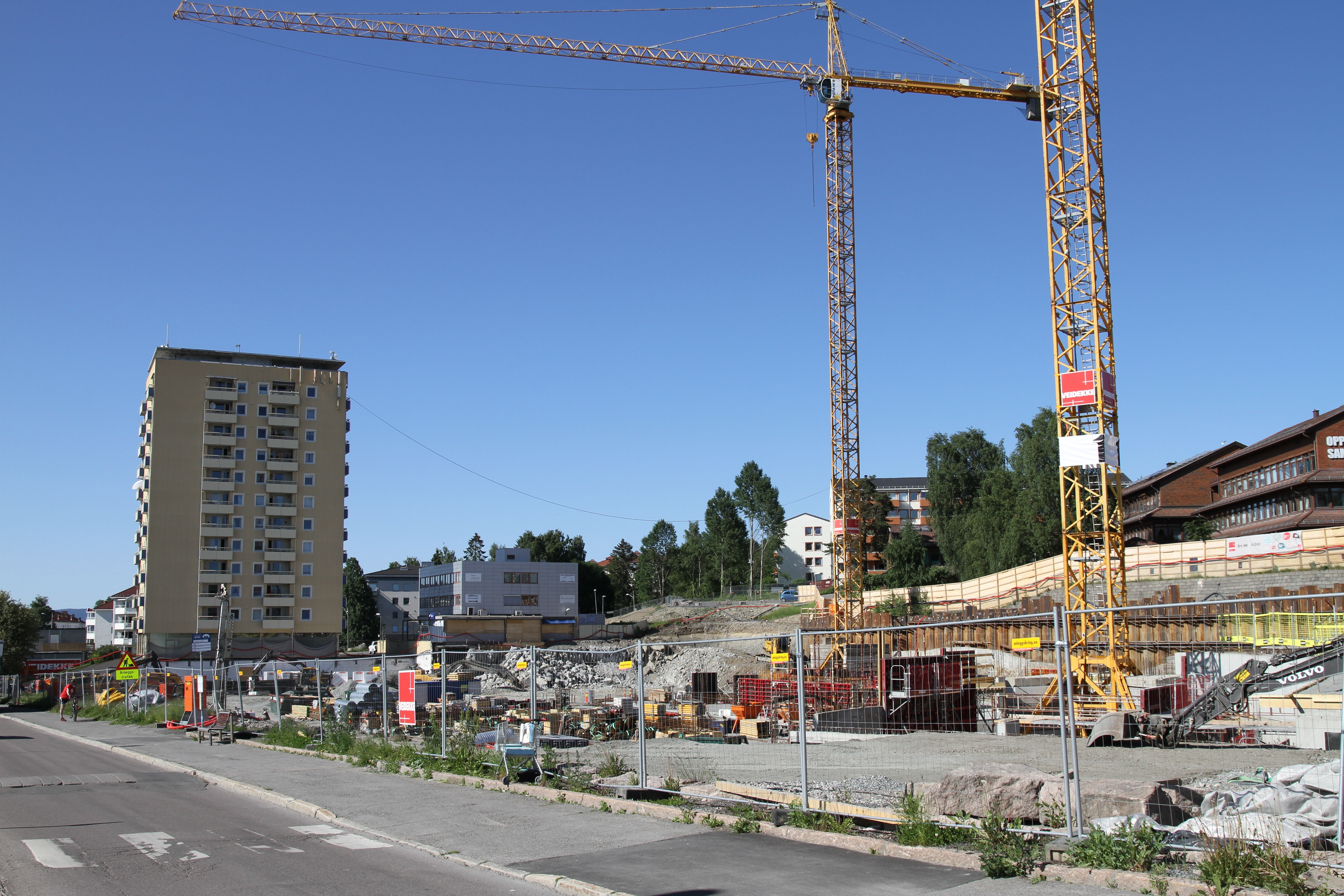 Oppsal senter sommeren 2016.